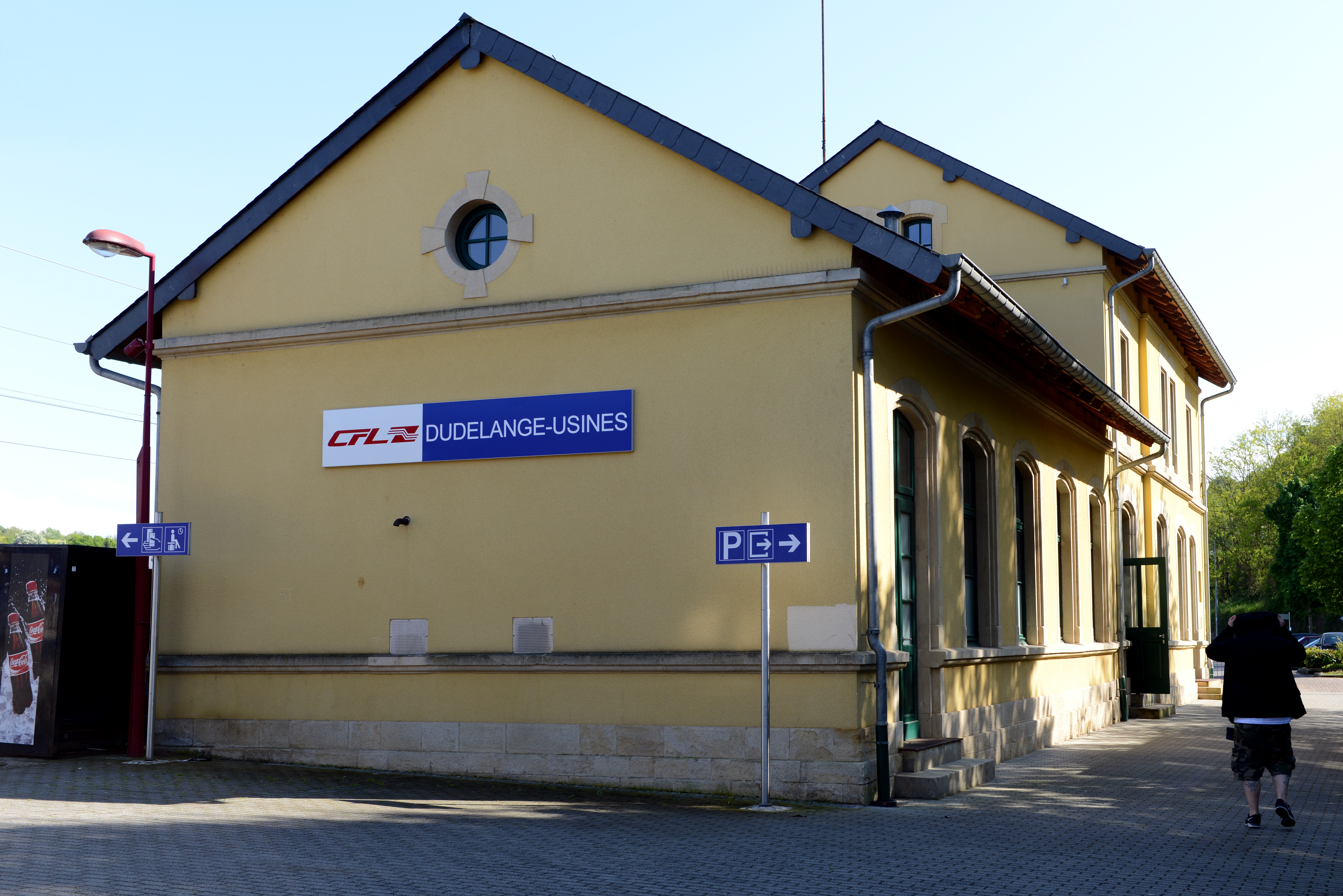 An engem Gebai: D'Gare-Usines an de Centre de documentation sur les migrations humaines am Quartier zu Diddeleng.